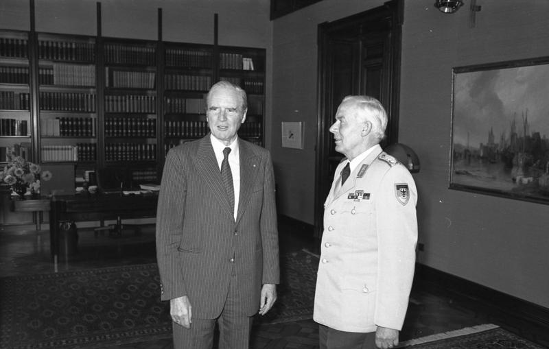 24.9.1981 Bundespräsident Prof. Dr. Karl Carstens empfängt Heeresinspekeur Generalleutnant Hans Poeppel (Abschiedsbesuch)